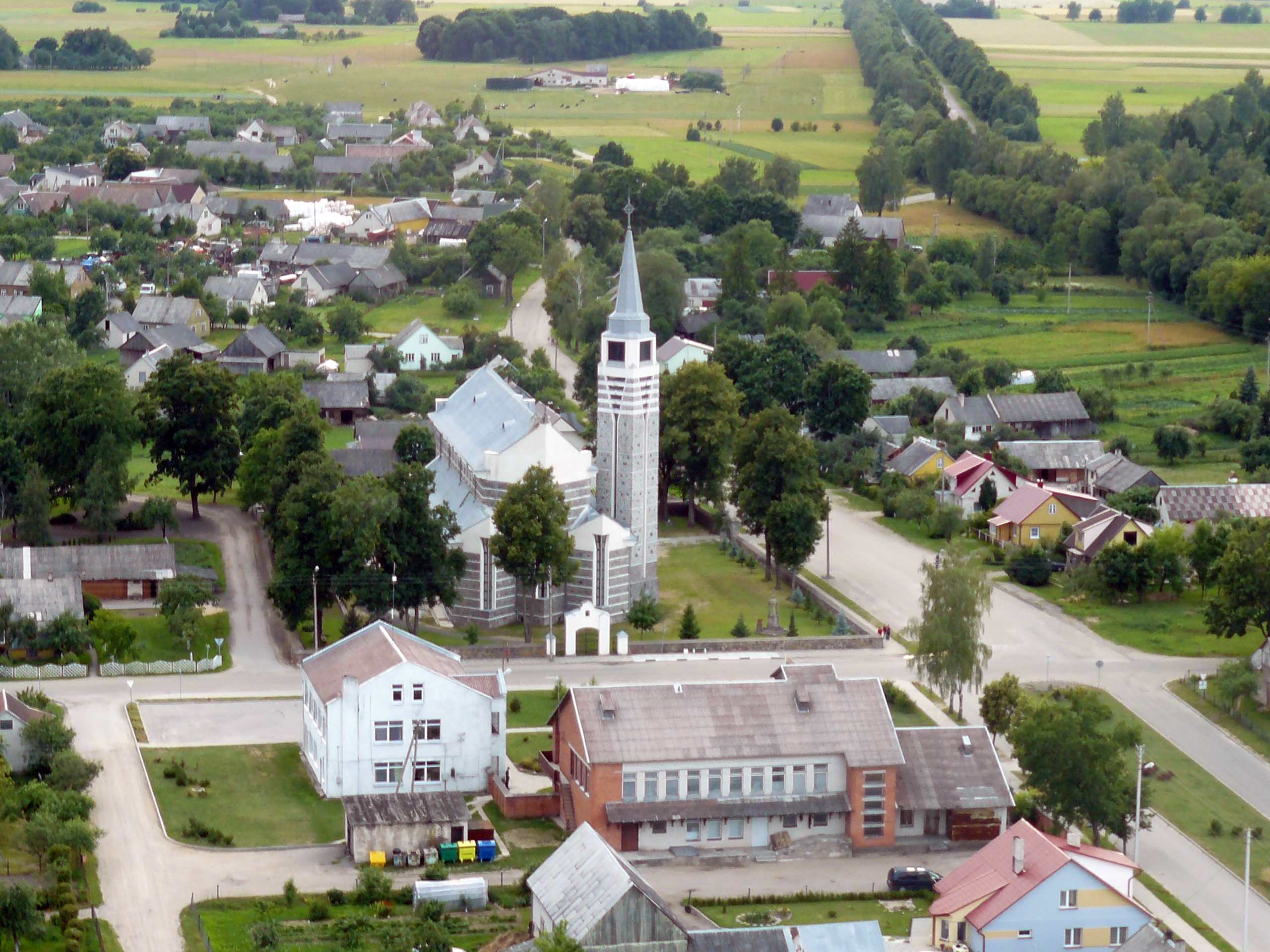 Nemakščiai 2008 07 06 per miestelio šventę.(Iš asmeninio R.Bardausko archyvo))